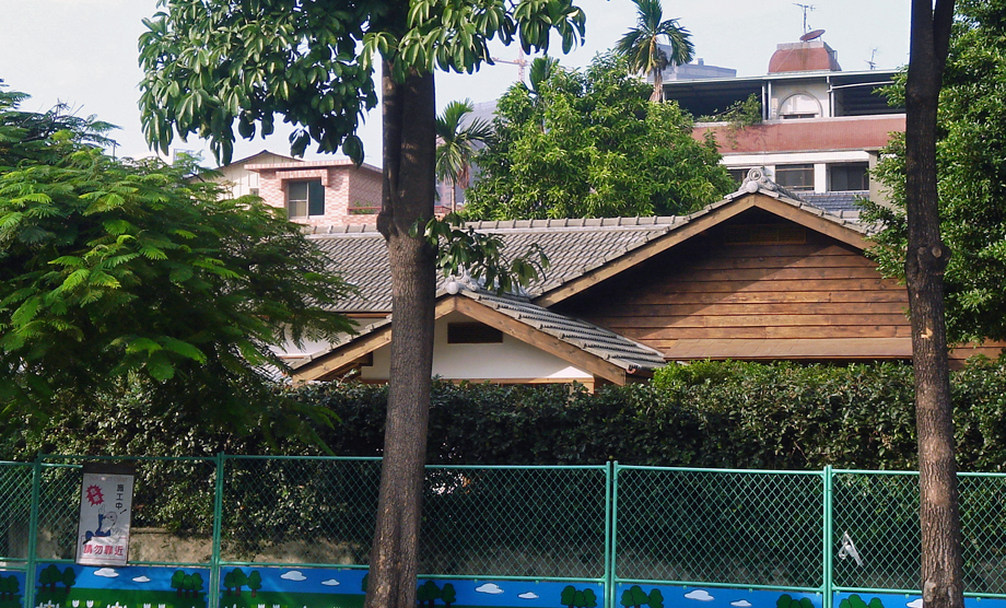 孫立人將軍故居。